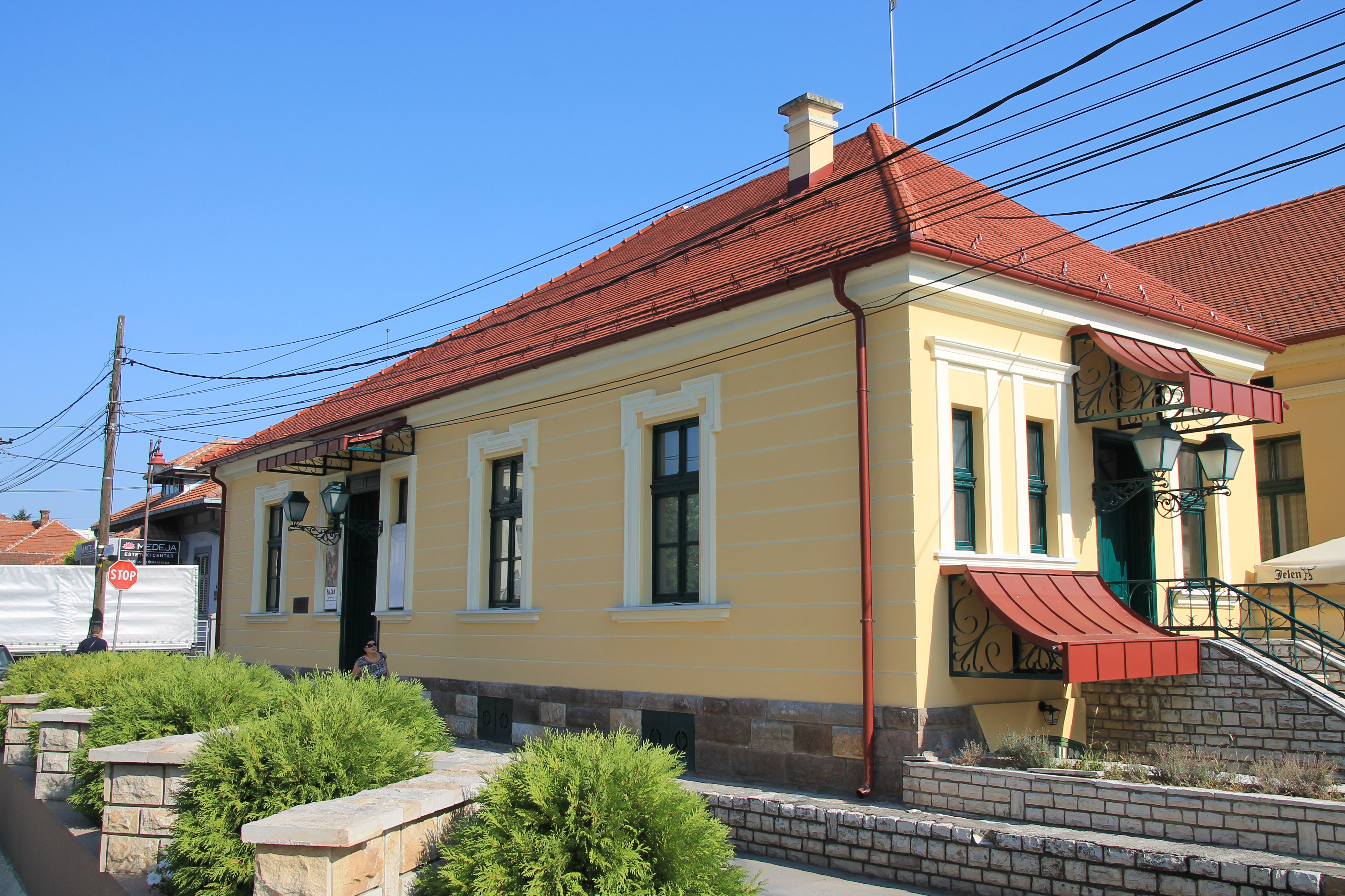 Buildings in Čačak